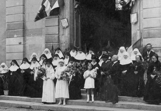 Remise de décorations aux Augustines de Carpentras 1918